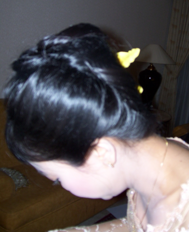 Sanggul modern